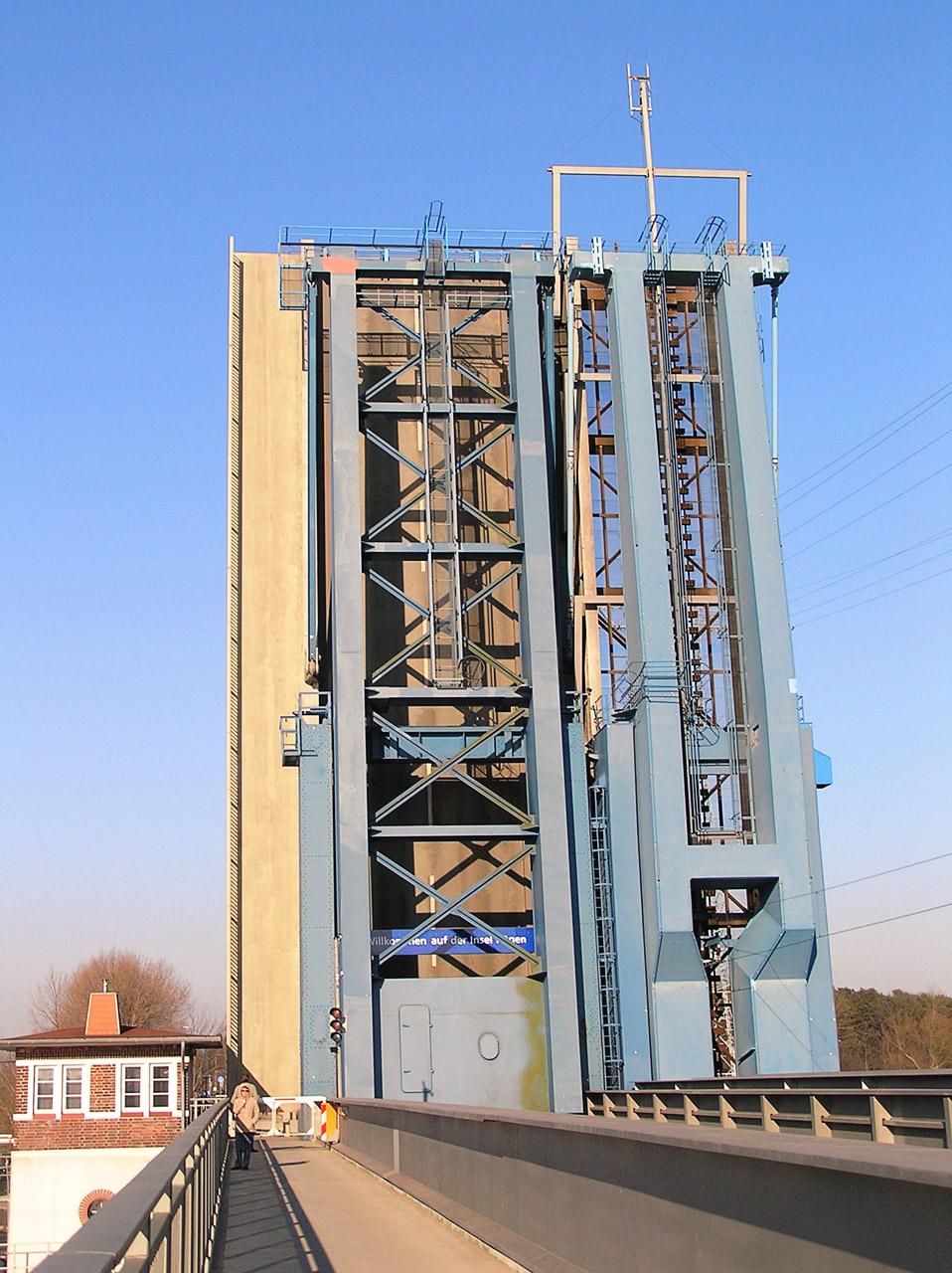 Beschreibung: Ziegelgrabenbrücke voll hochgeklappt Fotograf: Darkone, 1. April 2005